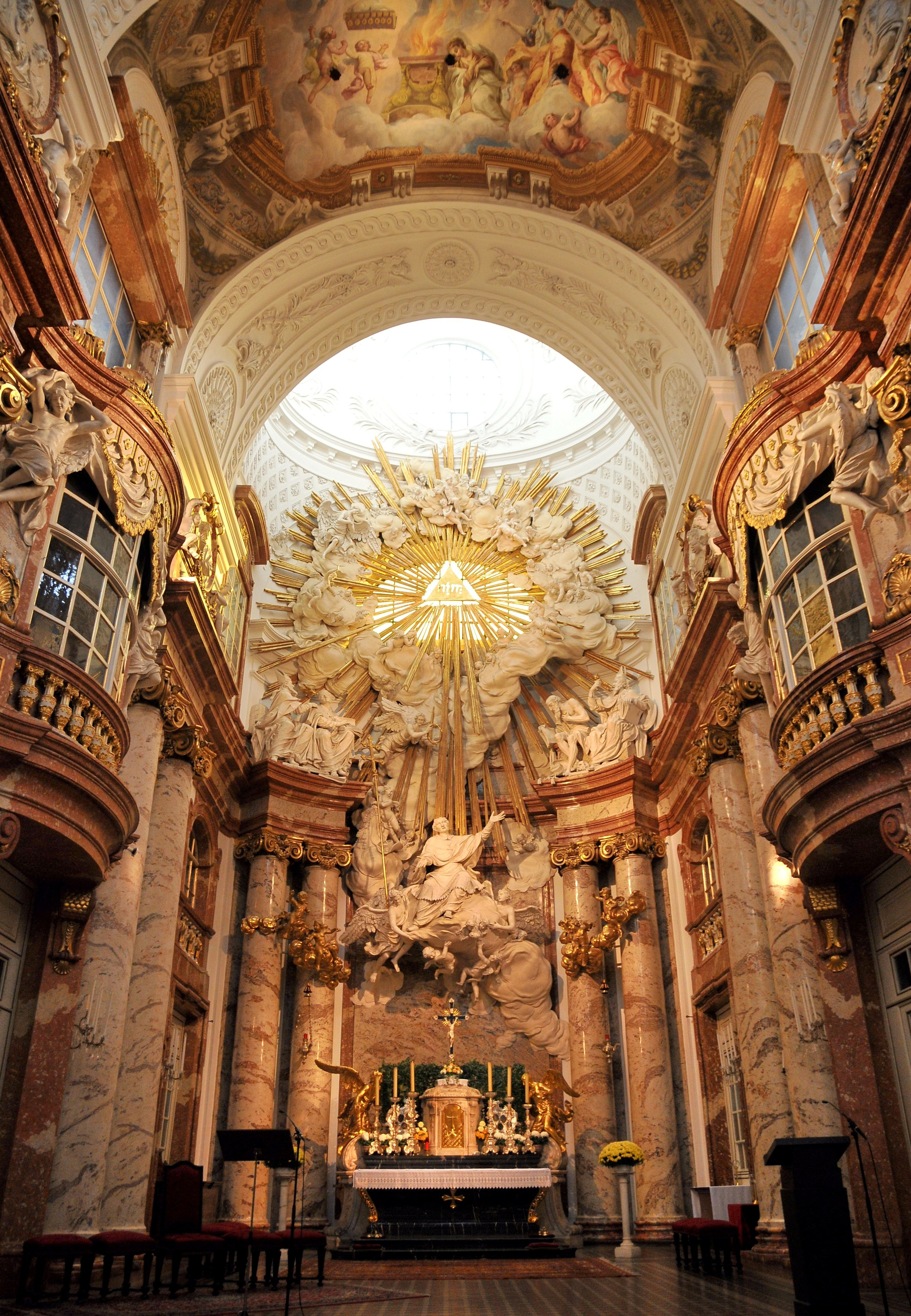 In der Wiener Karlskirche.